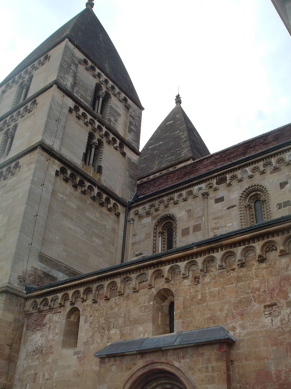 A jáki templom részlete. Saját készítésű kép